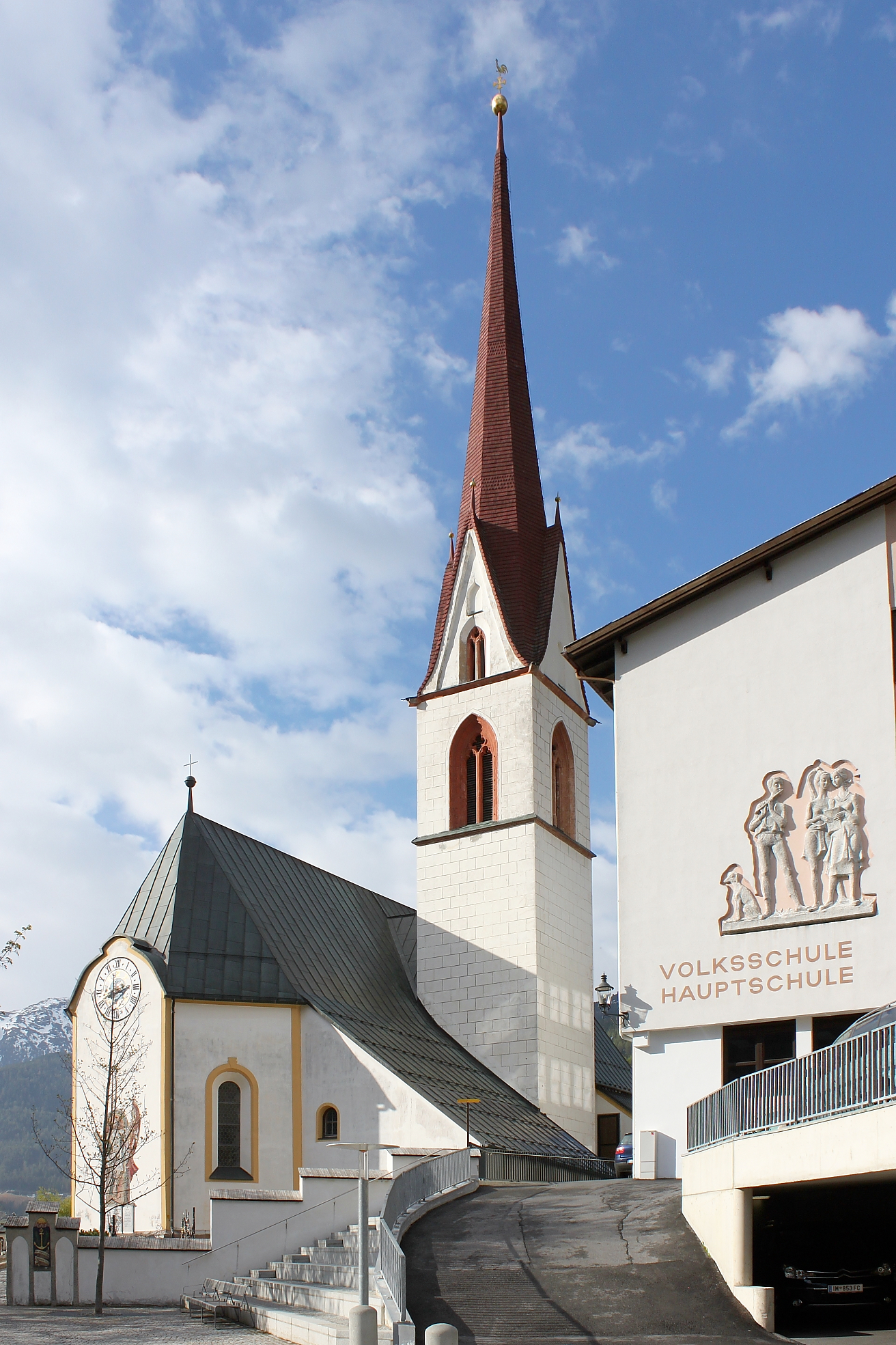 Die Pfarrkirche Mariä Heimsuchung in Sölden. Originalbild siehe Source.